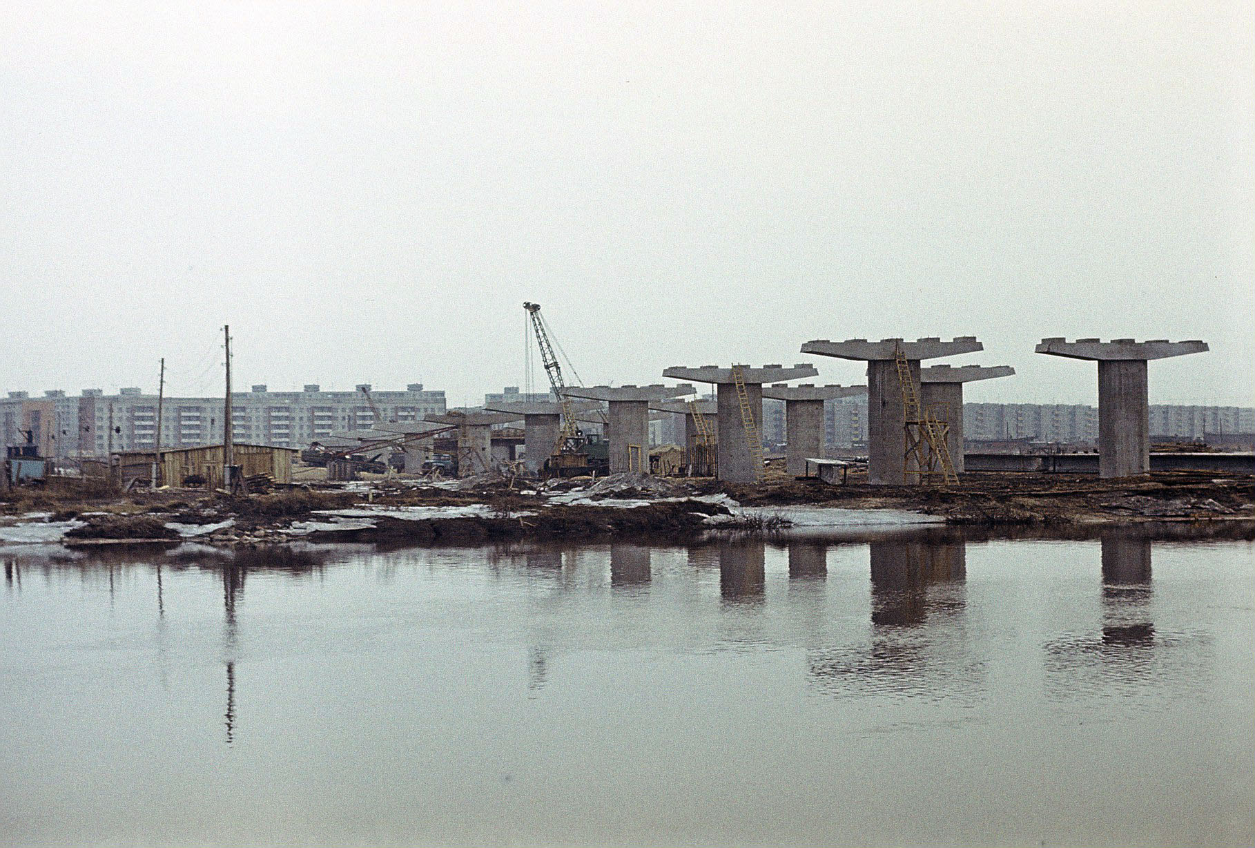 Ehitusjärgus Tartu Sõpruse sild